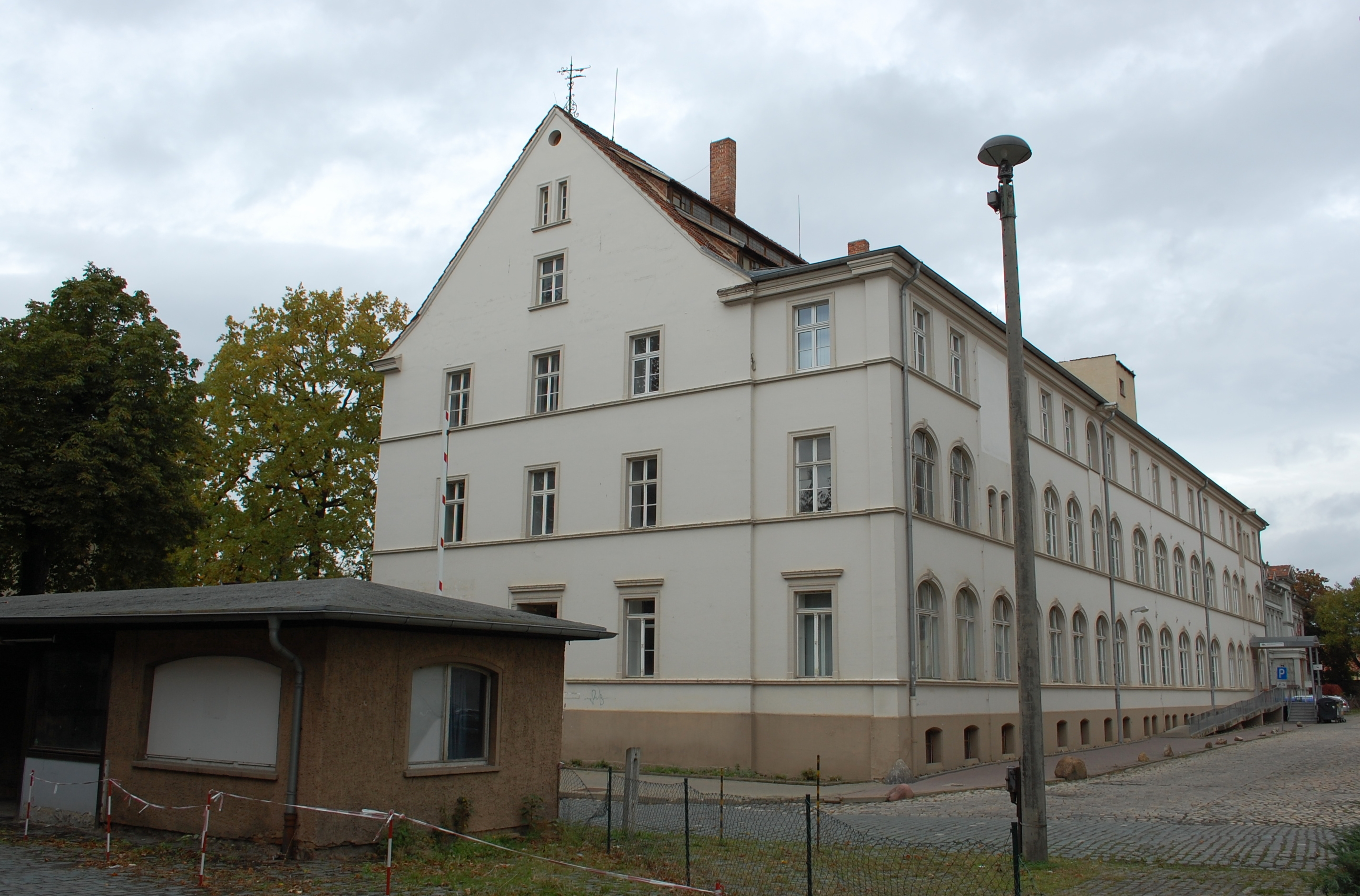 Haus Neuer Weg 21 in Quedlinburg